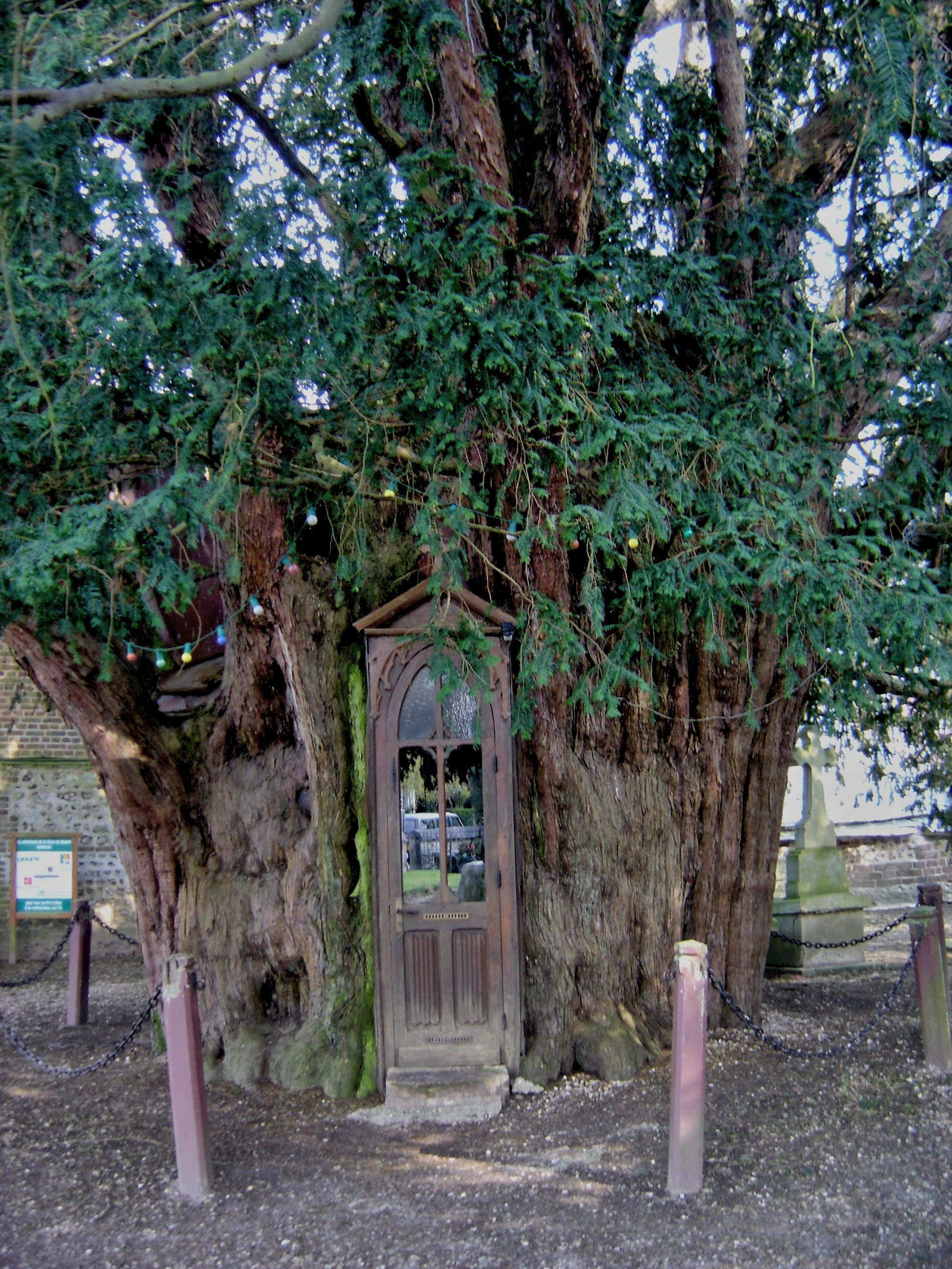 If millénaire à La Haye-de-Routot - Eure - France avec Chapelle Saint-Anne (circonférence 16 mètres). Les deux ifs de La Haye-de-Routot ont reçu le label « Arbre Remarquable de France » en juillet 2001.